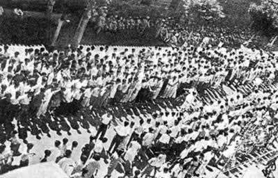 这是排列在北平街头上的示威队伍